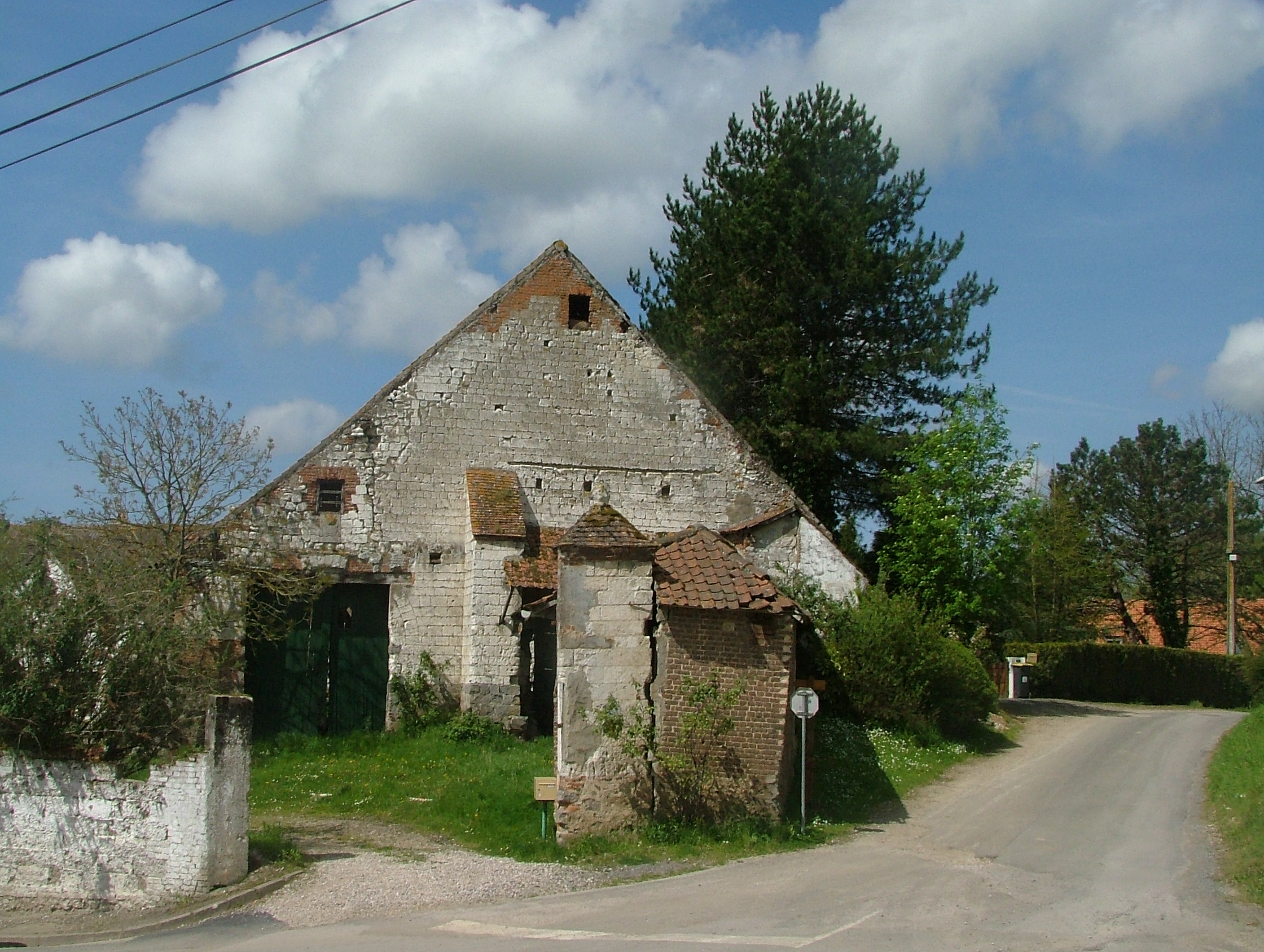 Ferme de l'Abbiette, à Attin .